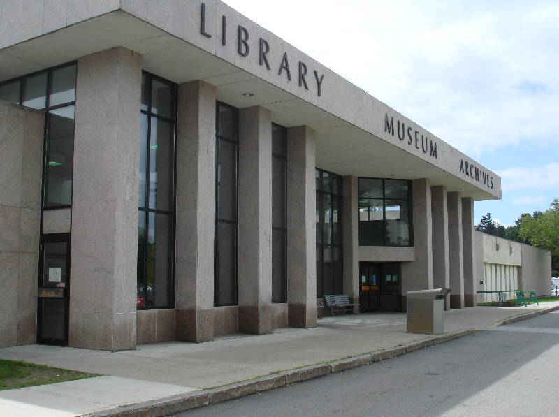 Maine State Museum, Augusta, Maine